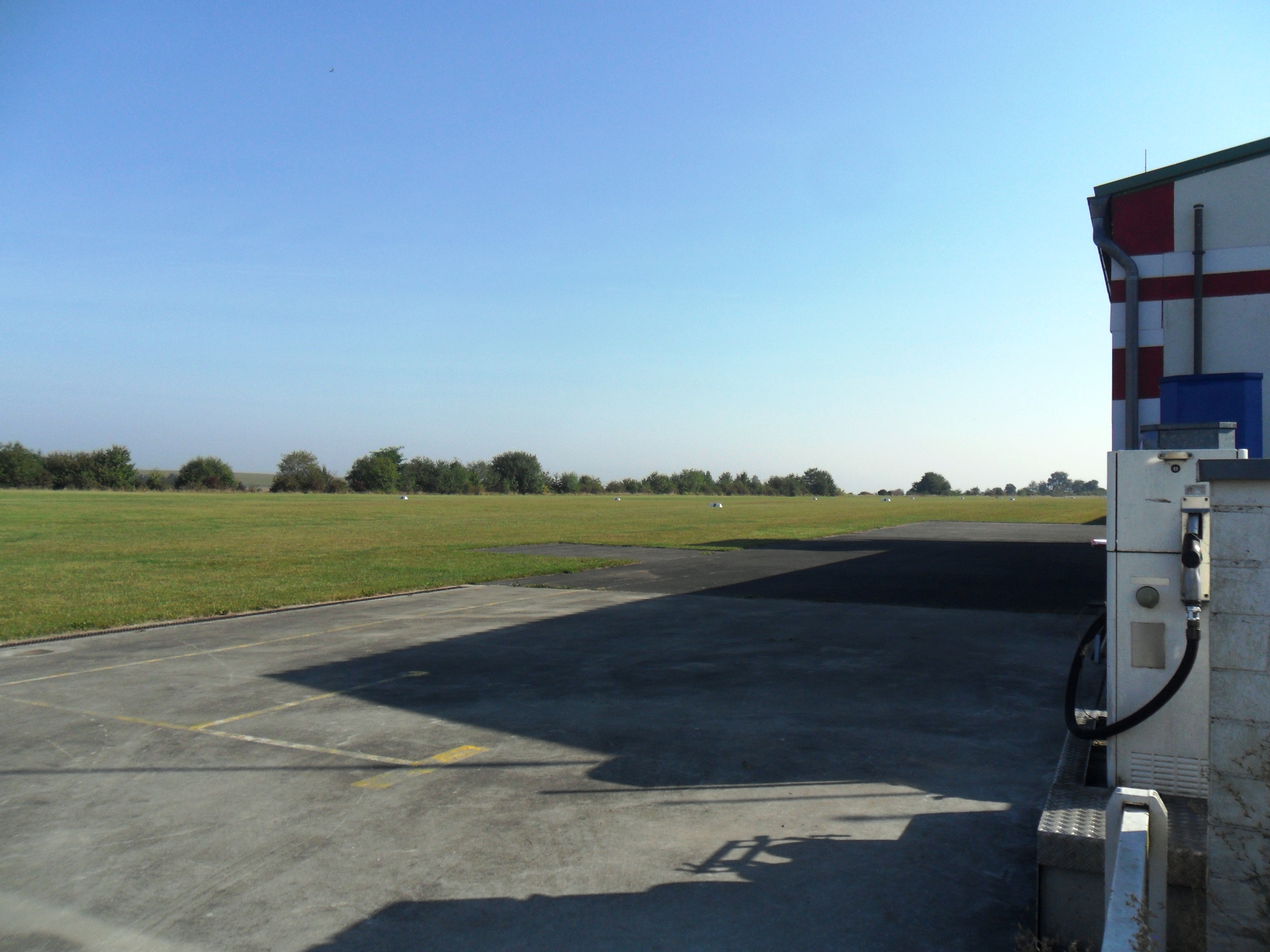 Flugplatz Hettstadt Landebahn 2016